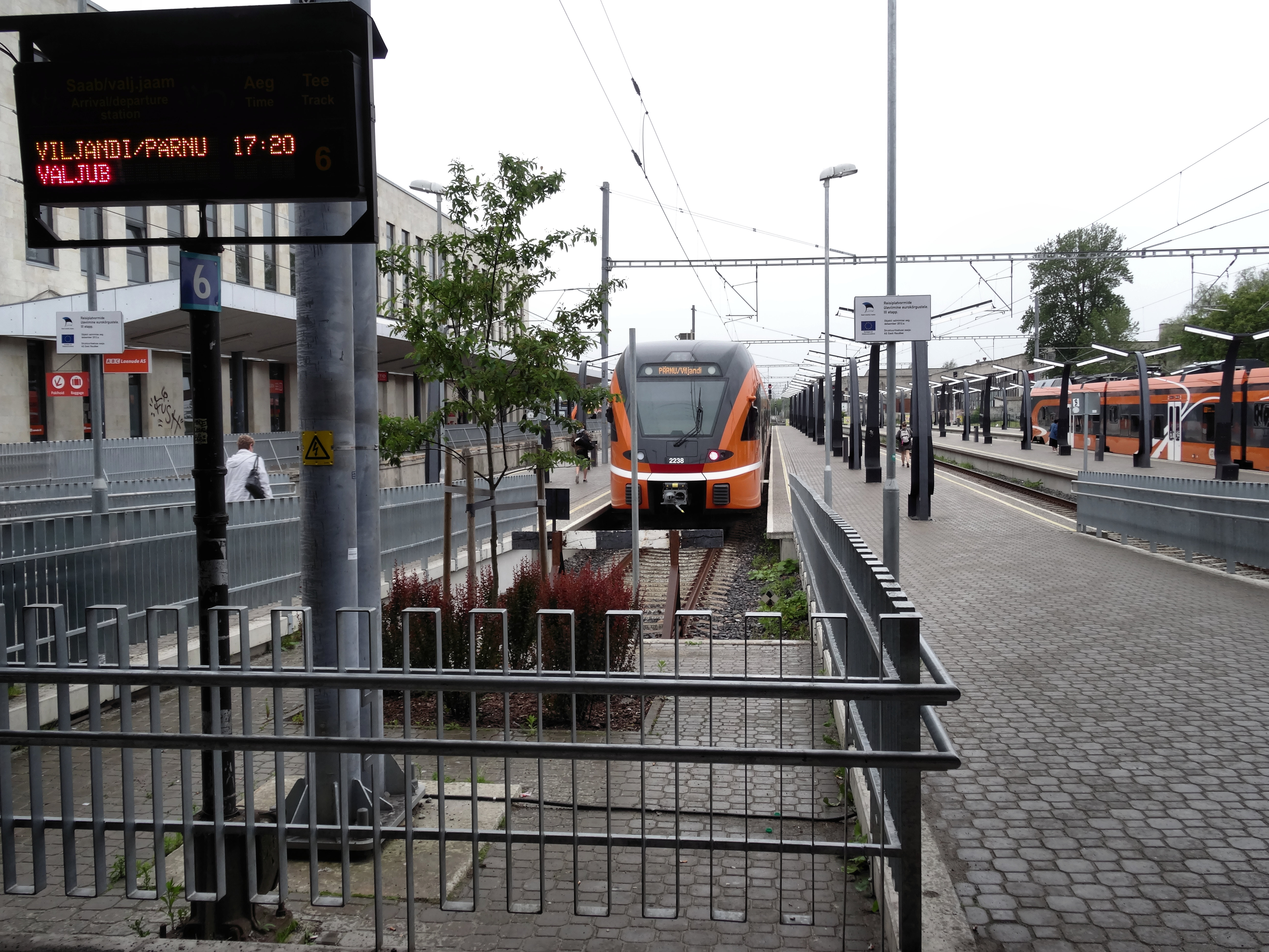 Balitscher Bahnhof Tallinn